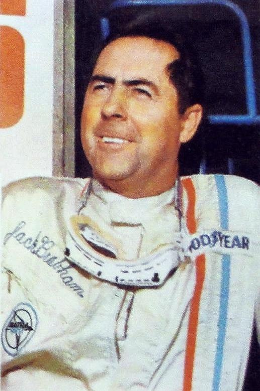 Jack Brabham en 1970 - Campioni dello Sport 1970-1971, n°58